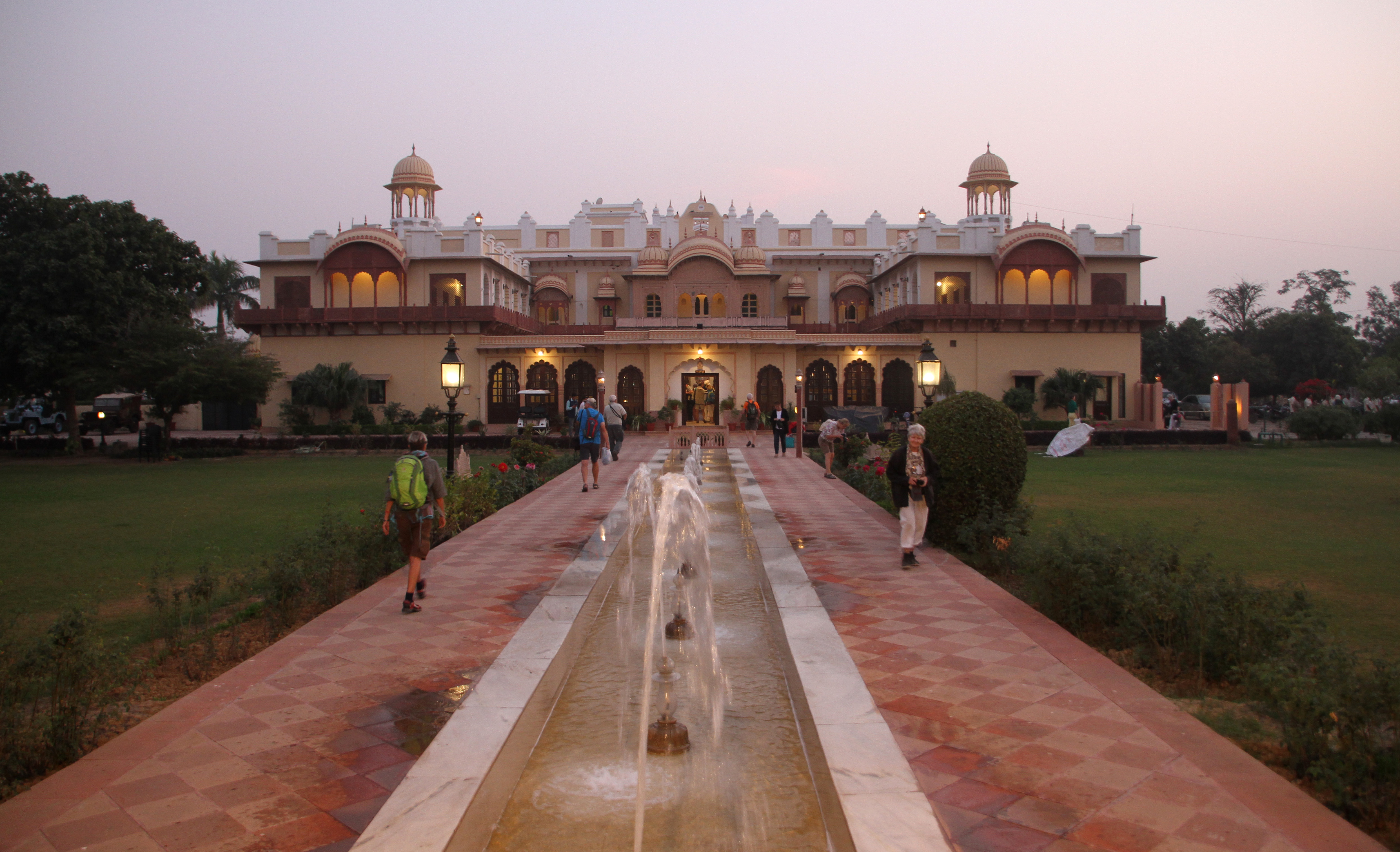 Laxmi Vilas Palace (Bharatpur)